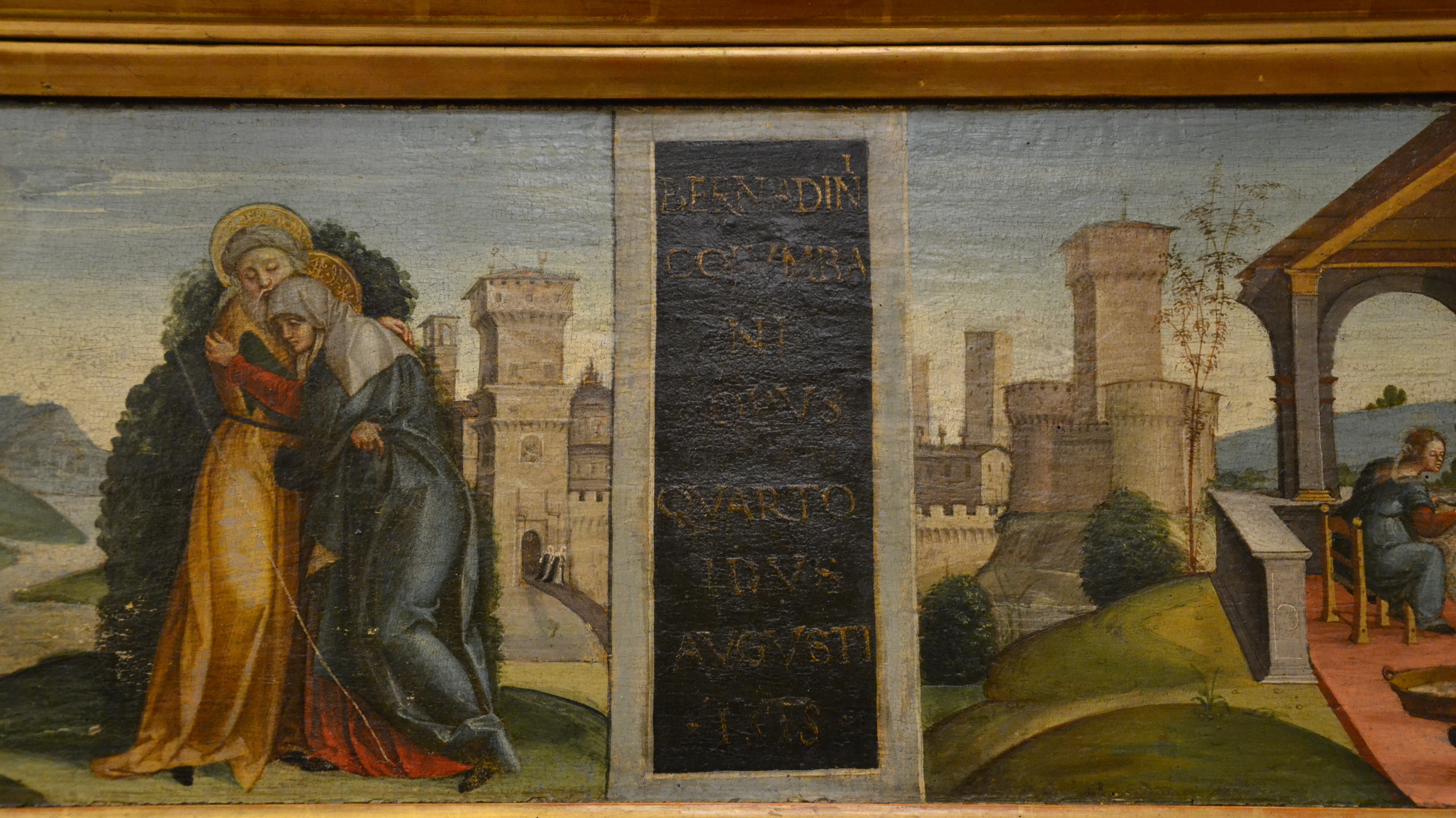 Chiesa di Santa Maria del Carmine (Pavia)